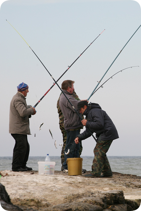 Рыбаки ловят рыбу